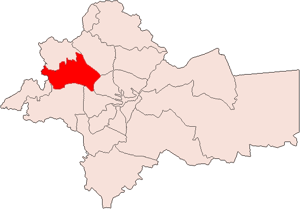 AMMAN-Tla’ Al ‘Ali.png — Maps of Amman User:Tarawneh/rami